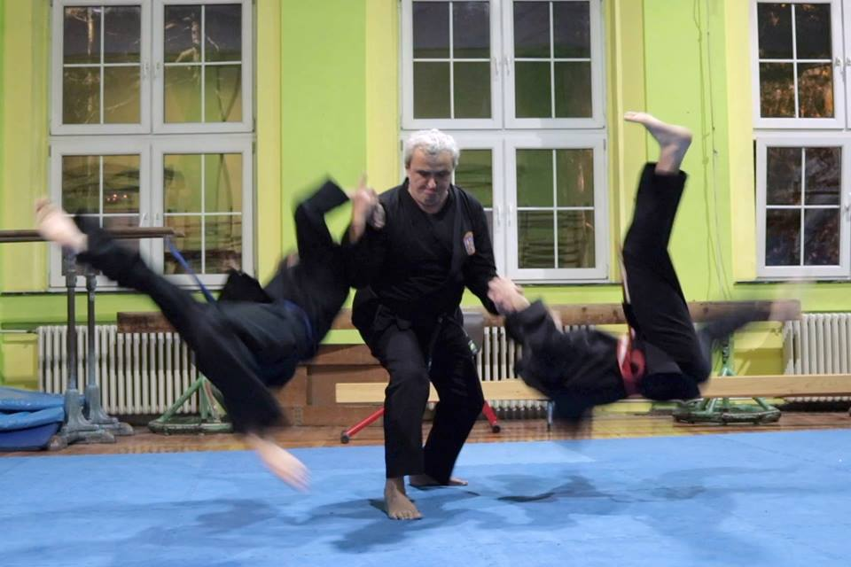 Srpski (latinica): 2018.Boris baca dvojicu 22.11.18.